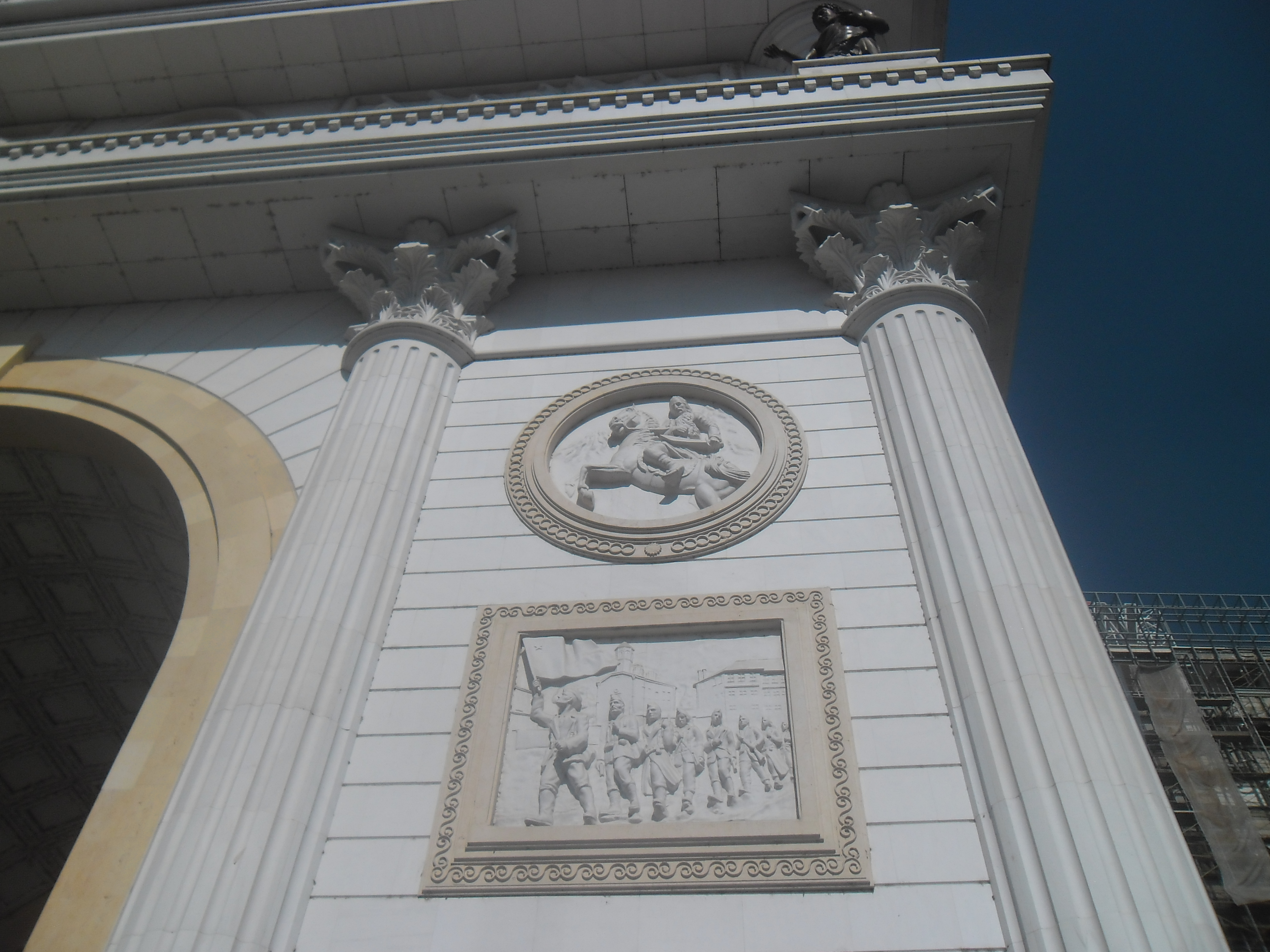 Skopje